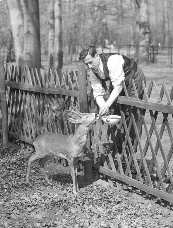 Zentralbild-Mihatsch 5.5.1957 Erfolge des Berliner Stadtbezirkes Treptow, UBz.: Freigehege im Plänterwald.